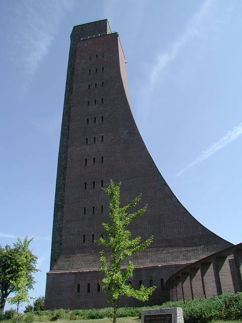 Laboe Ehrendenkmal, selbst fotografiert